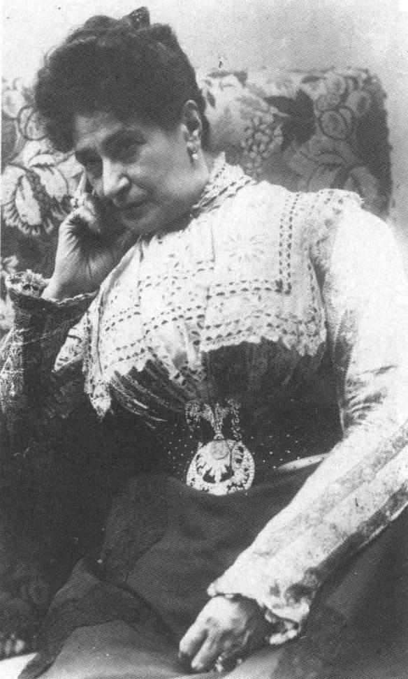 Alexandrine Zola, épouse d'Émile Zola, en 1900